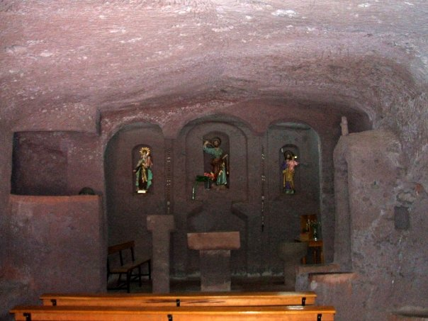 Chiesa grotta (in cueva Bermeja?)